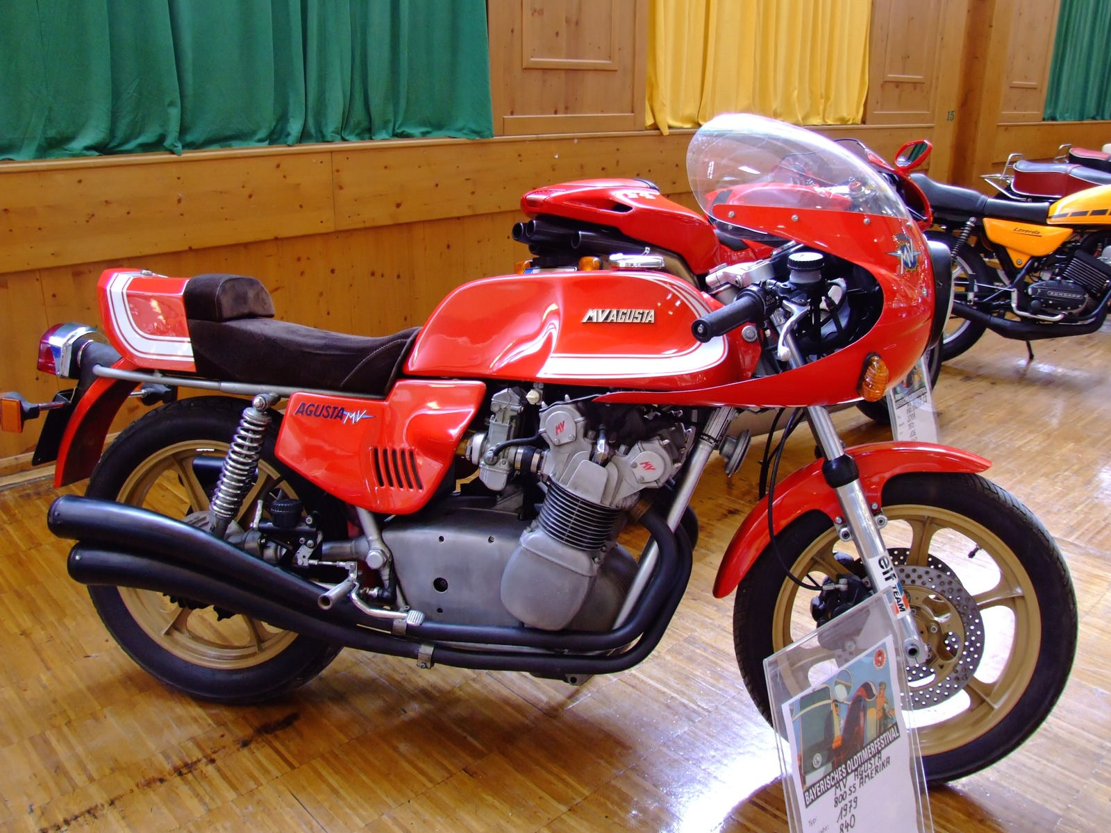 MV Agusta 800 SS Super America Baujahr: 1979 840 ccm 90 PS 220 km/h Quelle: selbst fotografiert, 07/2007 Fotograf: Späth Chr.